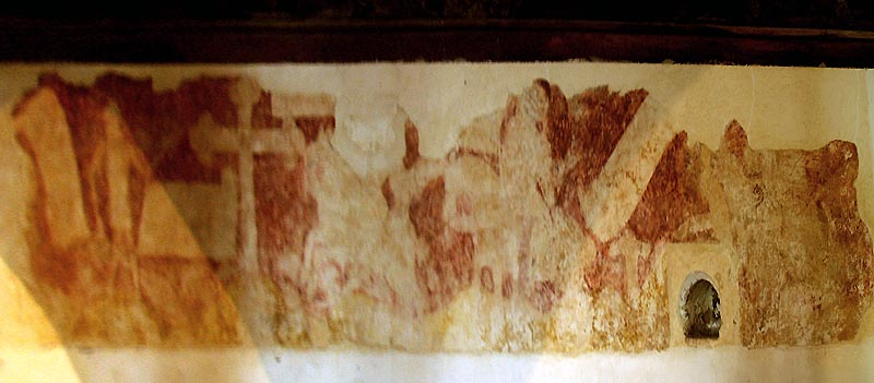 Chapelle Kermaria an Iskuit, commune de Plouha, Côtes-d'Armor (22), France. Fresque du Dit des 3 morts et des 3 vifs